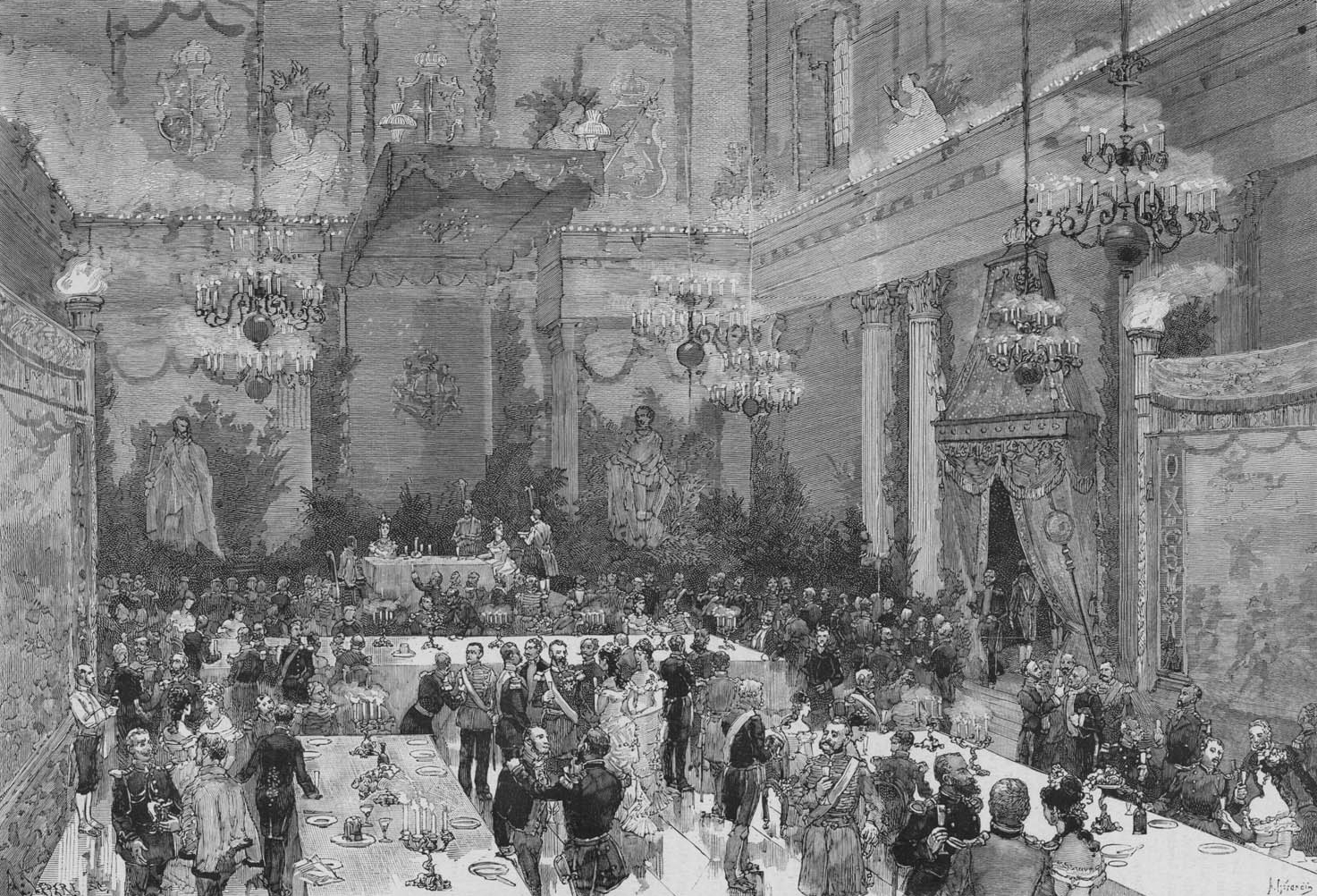 Bröllopet mellan Gustav V och Victoria i Rikssalen 1881 Depicted people: Gustav V, kung av Sverige and Viktoria av Baden – among others Published in Le Monde illustré, 22 October 1881.